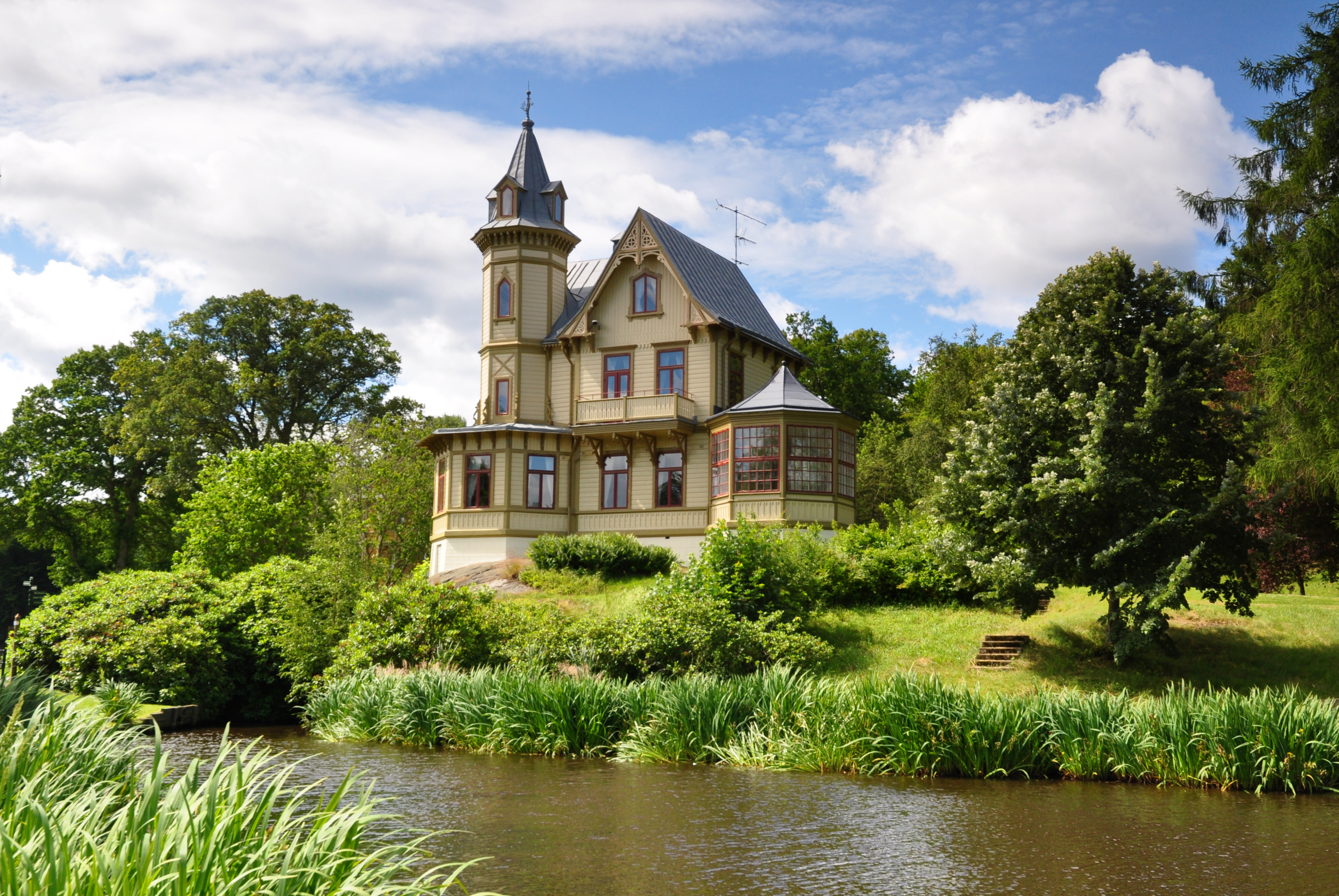 Karlstorp 2:1, Direktörsvillan i Ronneby brunnspark, Ronneby i Blekinge. Huset uppfördes 1884 för brunnsdirektören Ernst von Heidenstam. Arkitekt okänd.